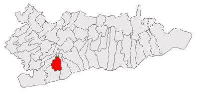 Categorie:Hărţi ale judeţului Călăraşi